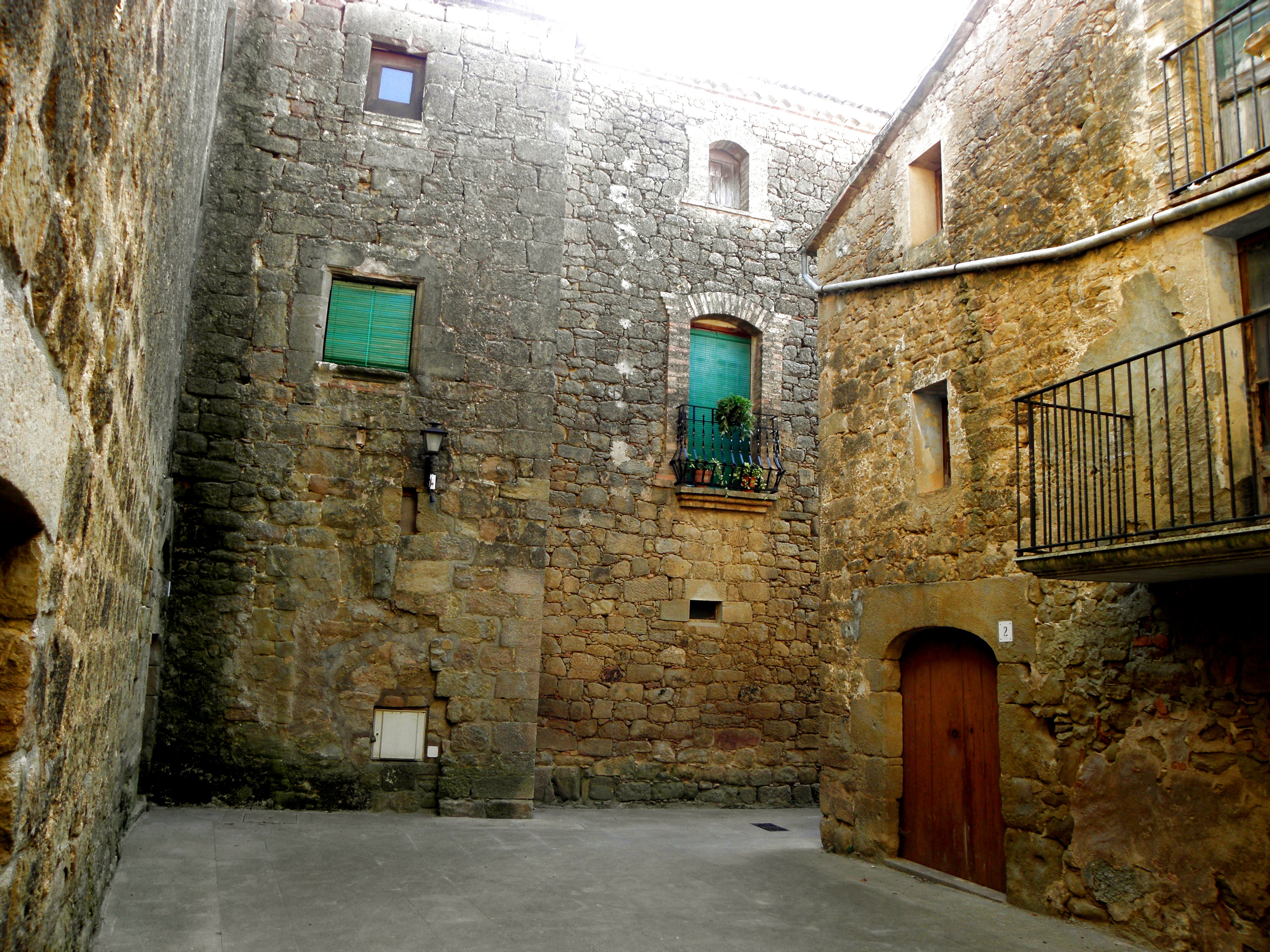 La vila closa de Sant Climenç, al municipi de Pinell de Solsonès. La placeta que hi ha un cop trspassat el portal d'accés.